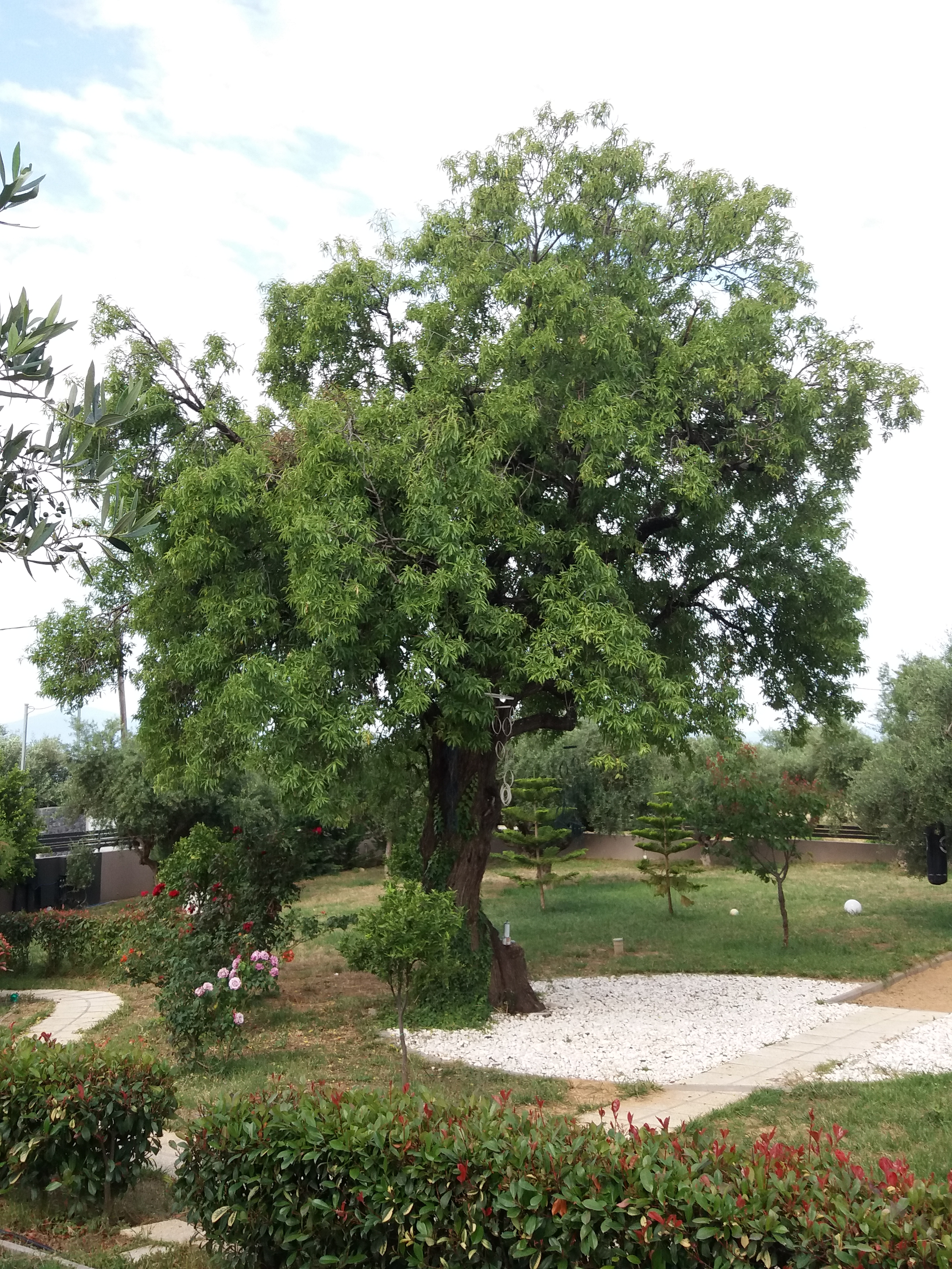 Αμυγδαλιά σε Καλλιθέα Καλαμάτας This is a photography of Natura 2000 protected area with ID GR2550006